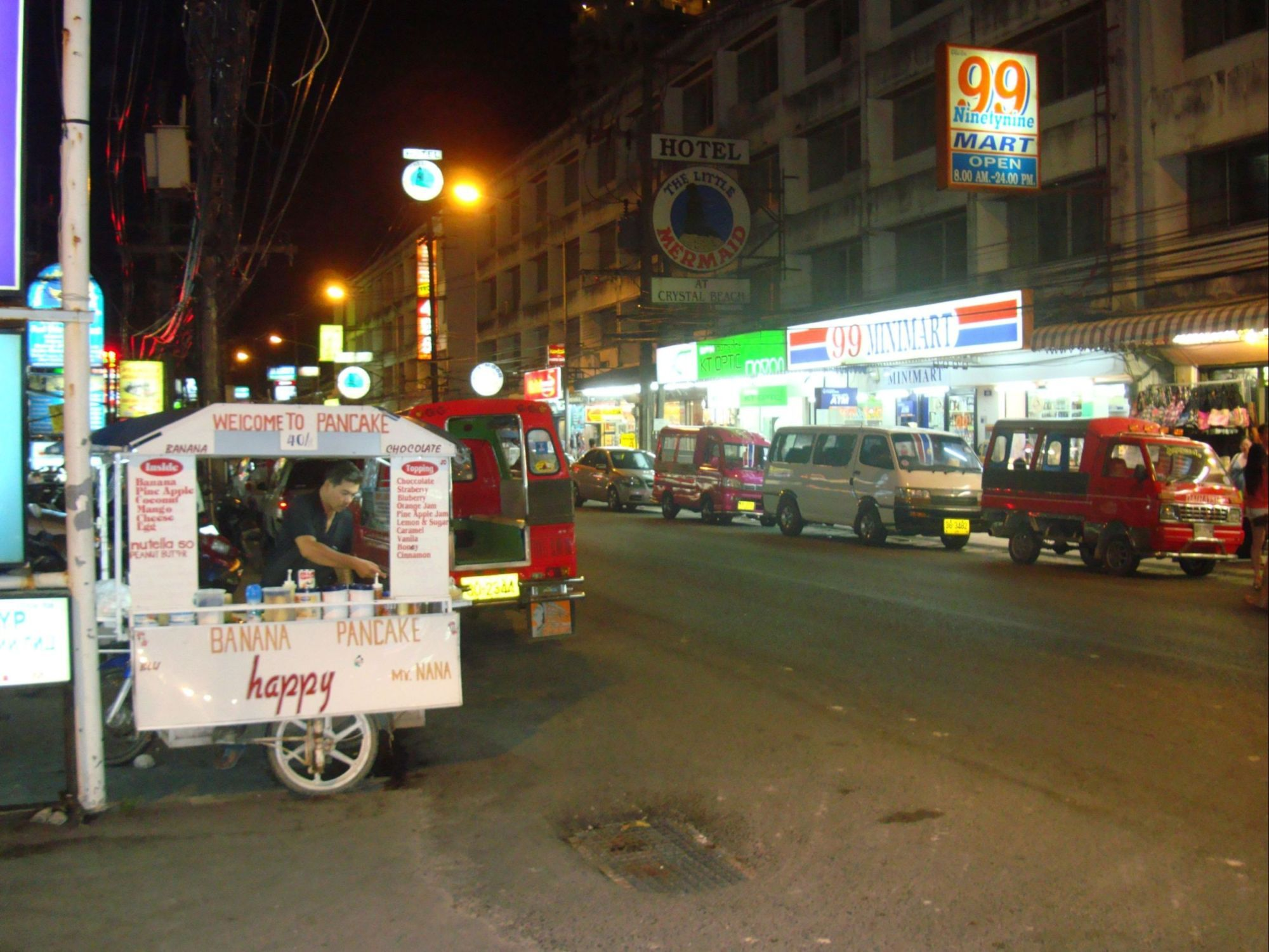 Улица Patak Road